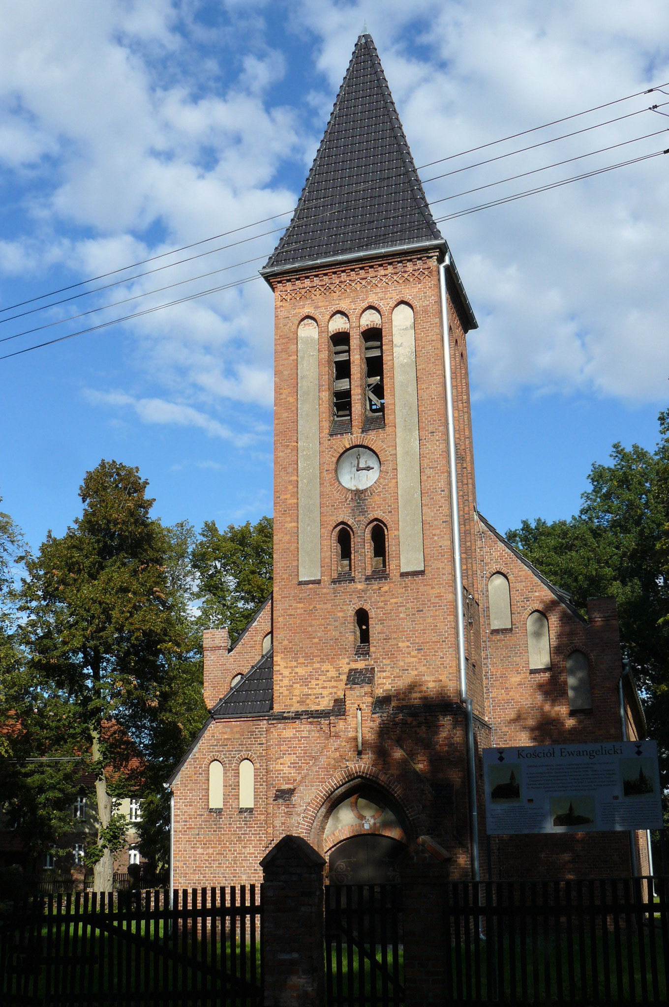 Kościół poprotestancki w Ryczywole po odbudowie hełmu.